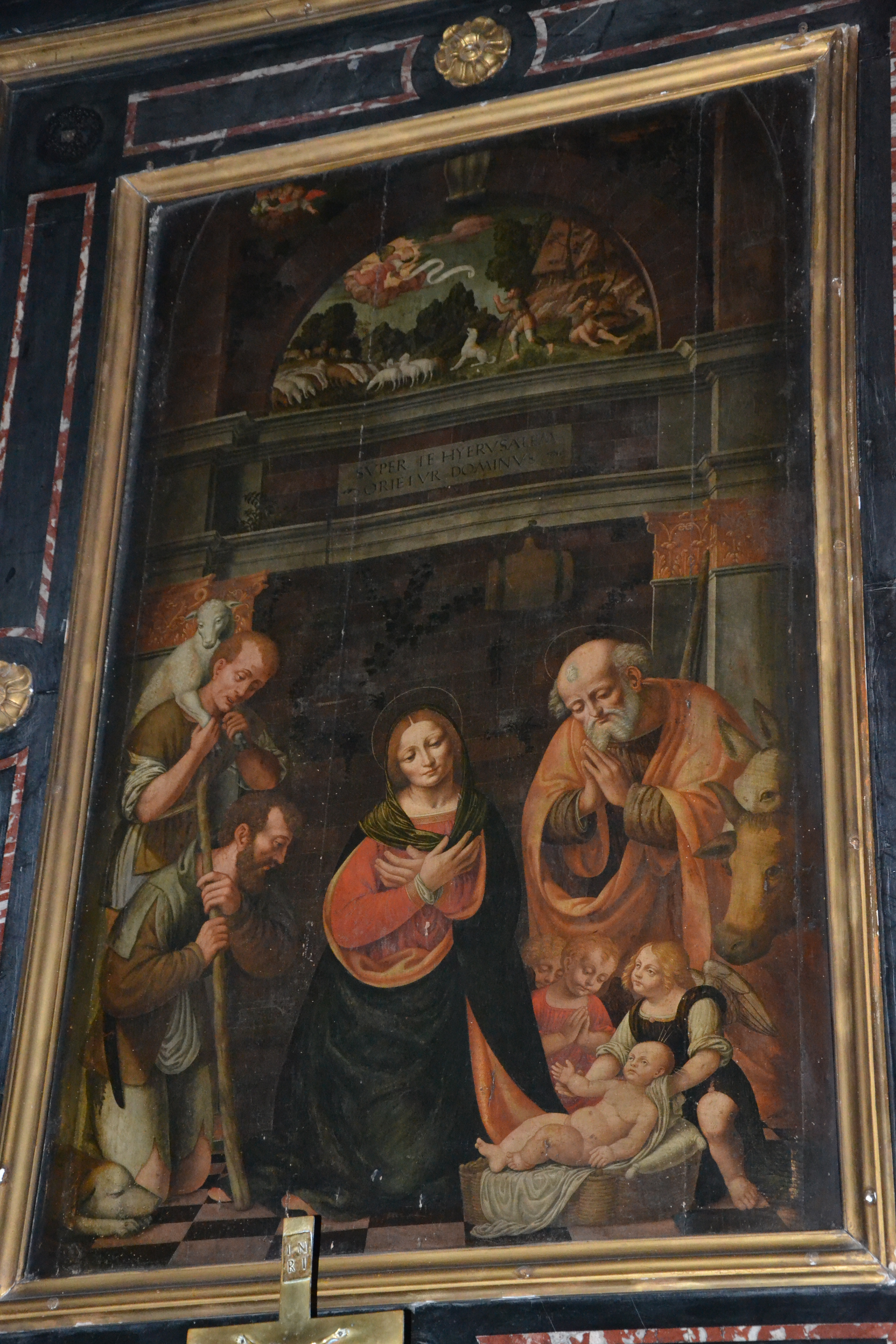 Chiesa dei Santi Fermo e Rustico (Caravaggio). Adorazione dei pastori del 1529, recante la firma autografa di Nicola Moietta e conservata nella seconda cappella a sinistra della chiesa dei Santi Fermo e Rustico di Caravaggio. Inizialmente costituita da un'unica tavola, venne in seguito tagliata verticalmente e suddivisa in tre pannelli, uno centrale più grande (un tempo centinato) e due laterali minori. Ciò è testimoniato dalla presenza di numerosi dettagli pittorici che si collocano a cavallo dei pannelli adiacenti, come ad esempio la continuazione del corpo di un cane, a sinistra, e di un bue, a destra. Il carattere della Vergine e il forte chiaroscuro denunciano un'evidente influenza leonardesca.